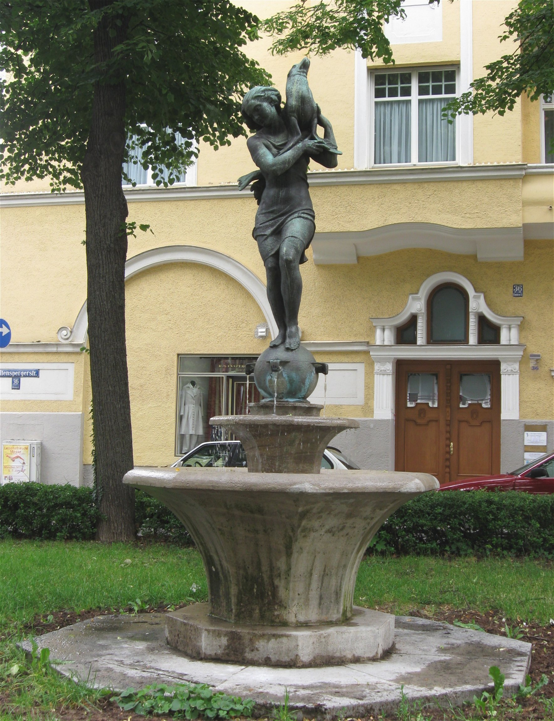 Brunnen, Mädchen mit Seehund, von Ferdinand Liebermann 1930, Hohenzollernstraße, Nähe Hohenzollernplatz, München